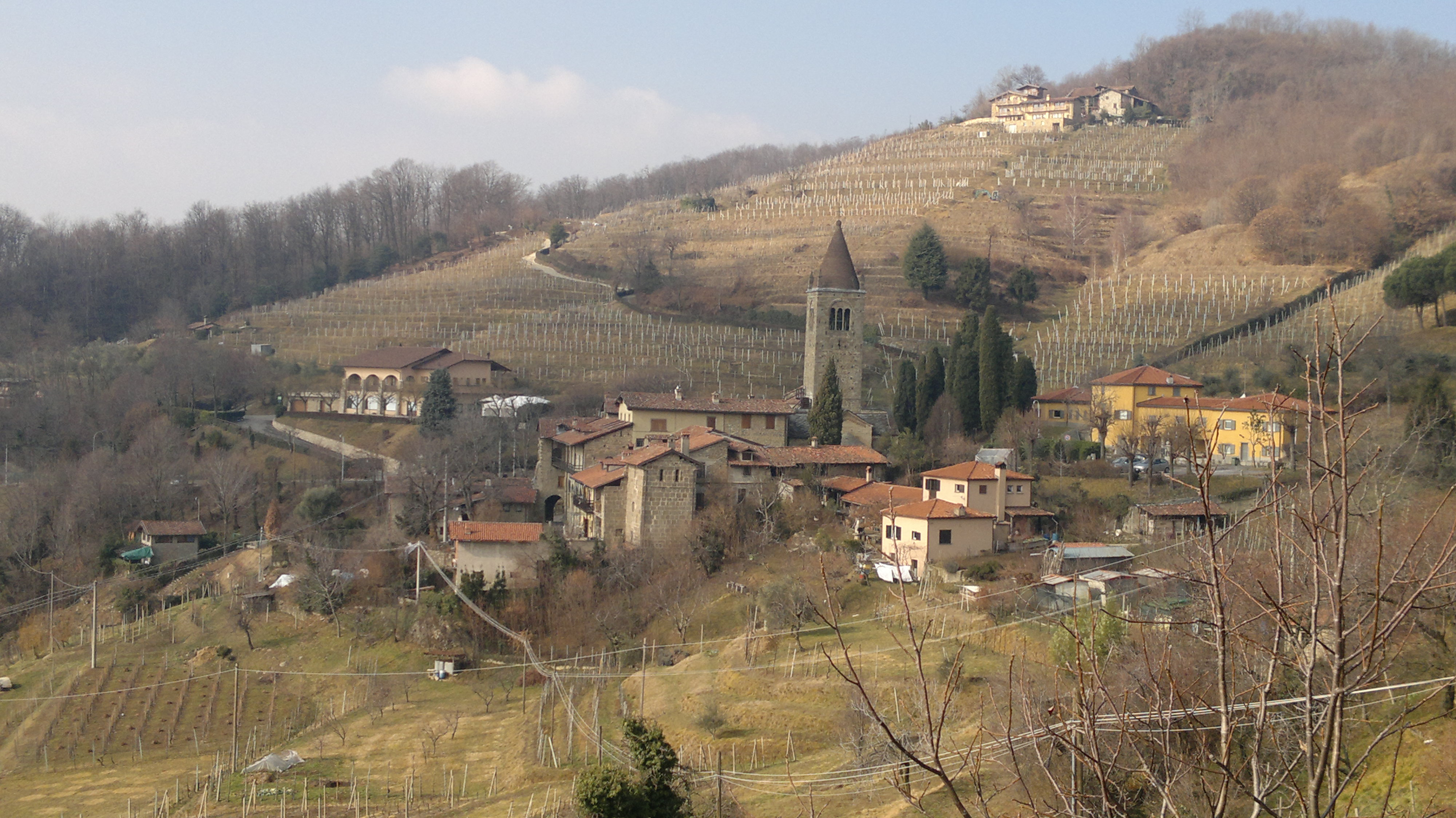 Veduta del complesso monastico di Fontanella di Sotto il Monte Giovanni XXIII e della collina